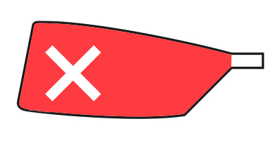 Blad van roeivereniging Breda